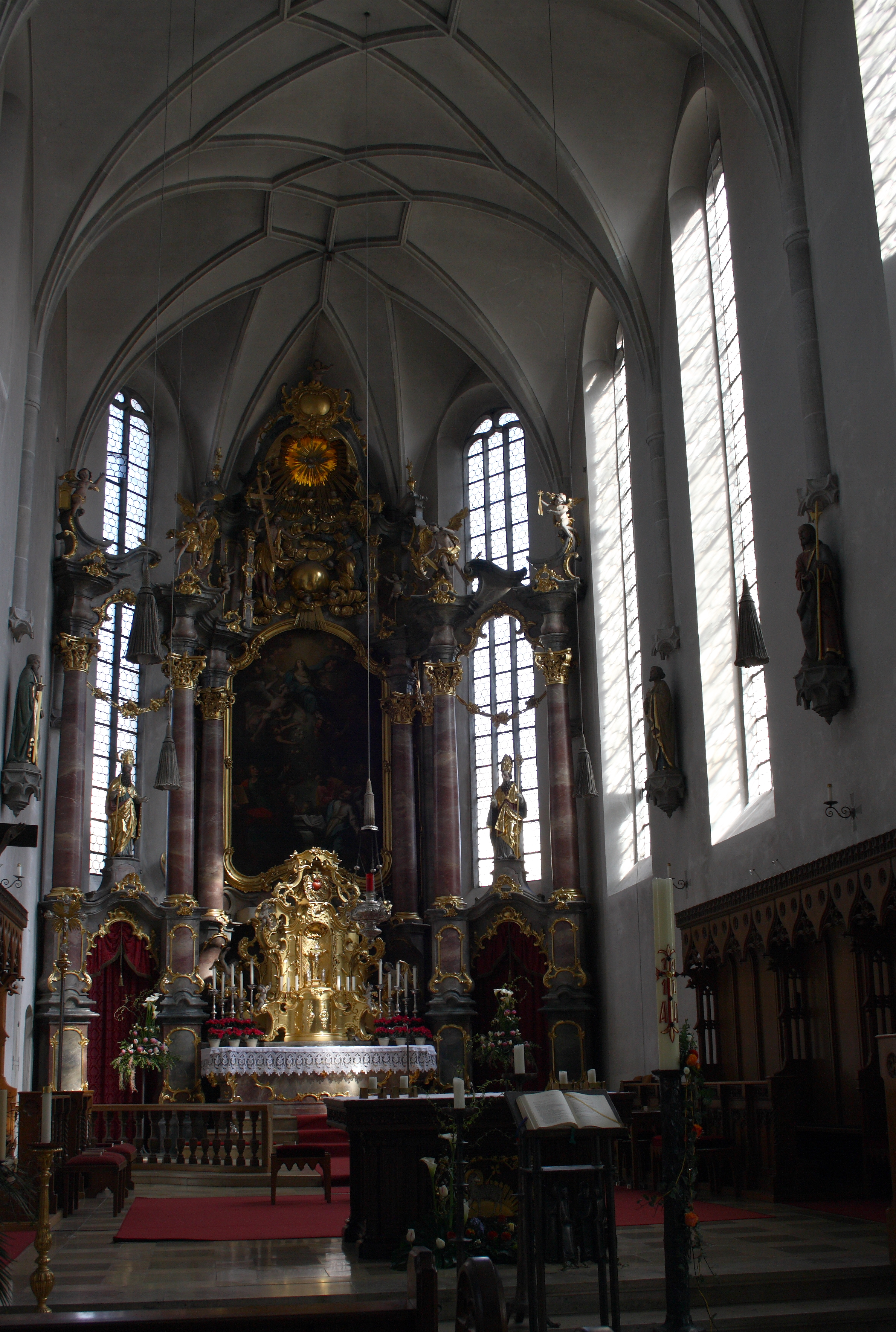 Katholische Stadtpfarrkirche Mariä Himmelfahrt in Aichach im Landkreis Aichach-Friedberg (Bayern), Chor